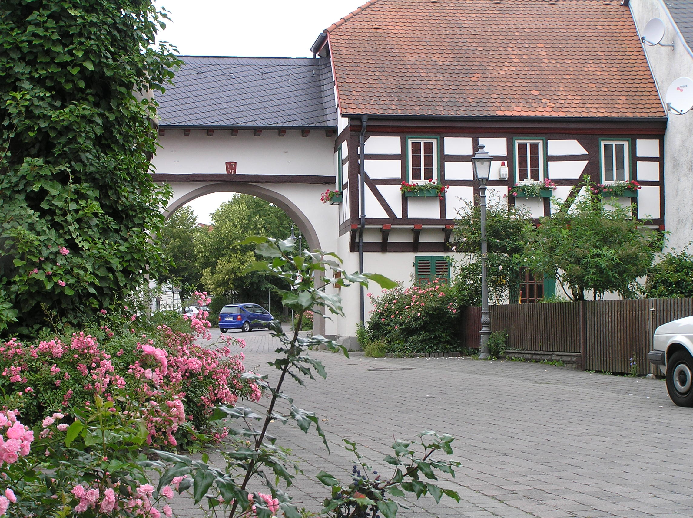 Stadttor Wehrheim Rückseite